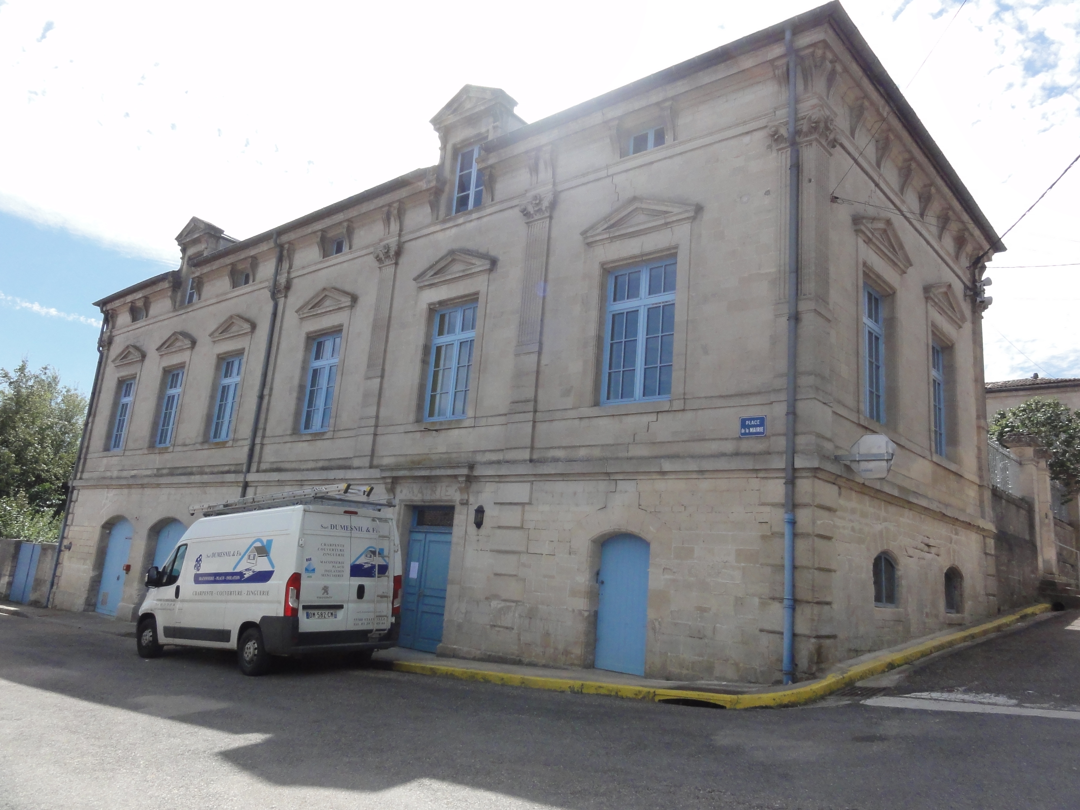 Dammarie-sur-Saulx (Meuse) mairie